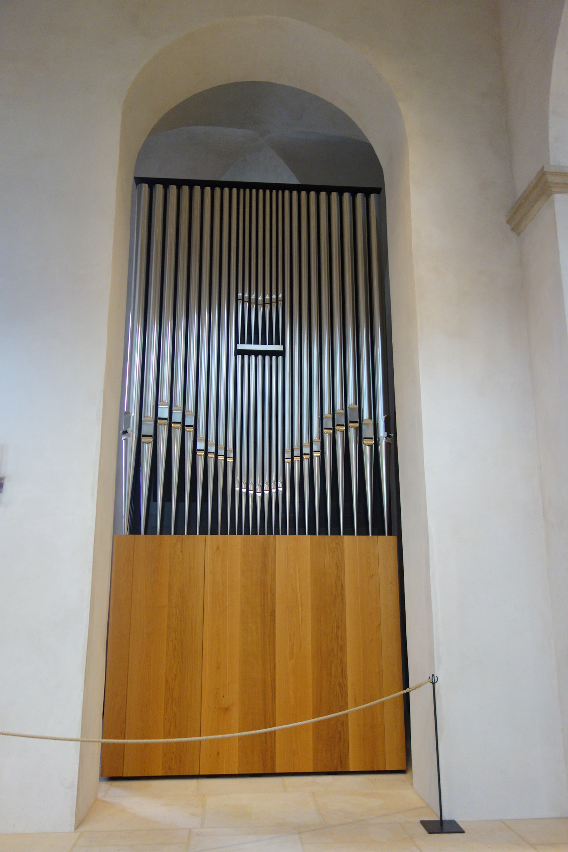 Hildesheimer Dom, Niedersachsen, Deutschland